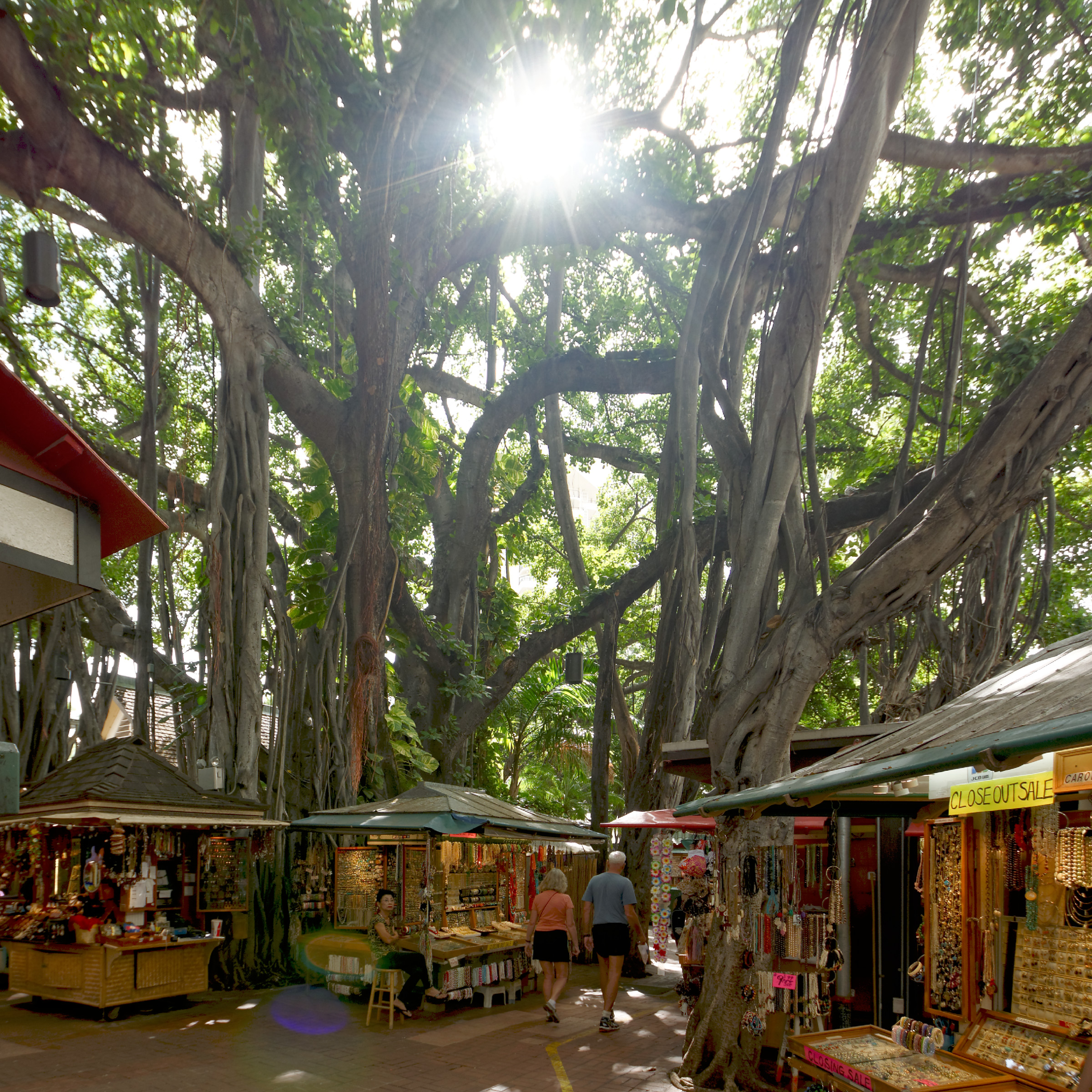 International Marketplace - Waikiki